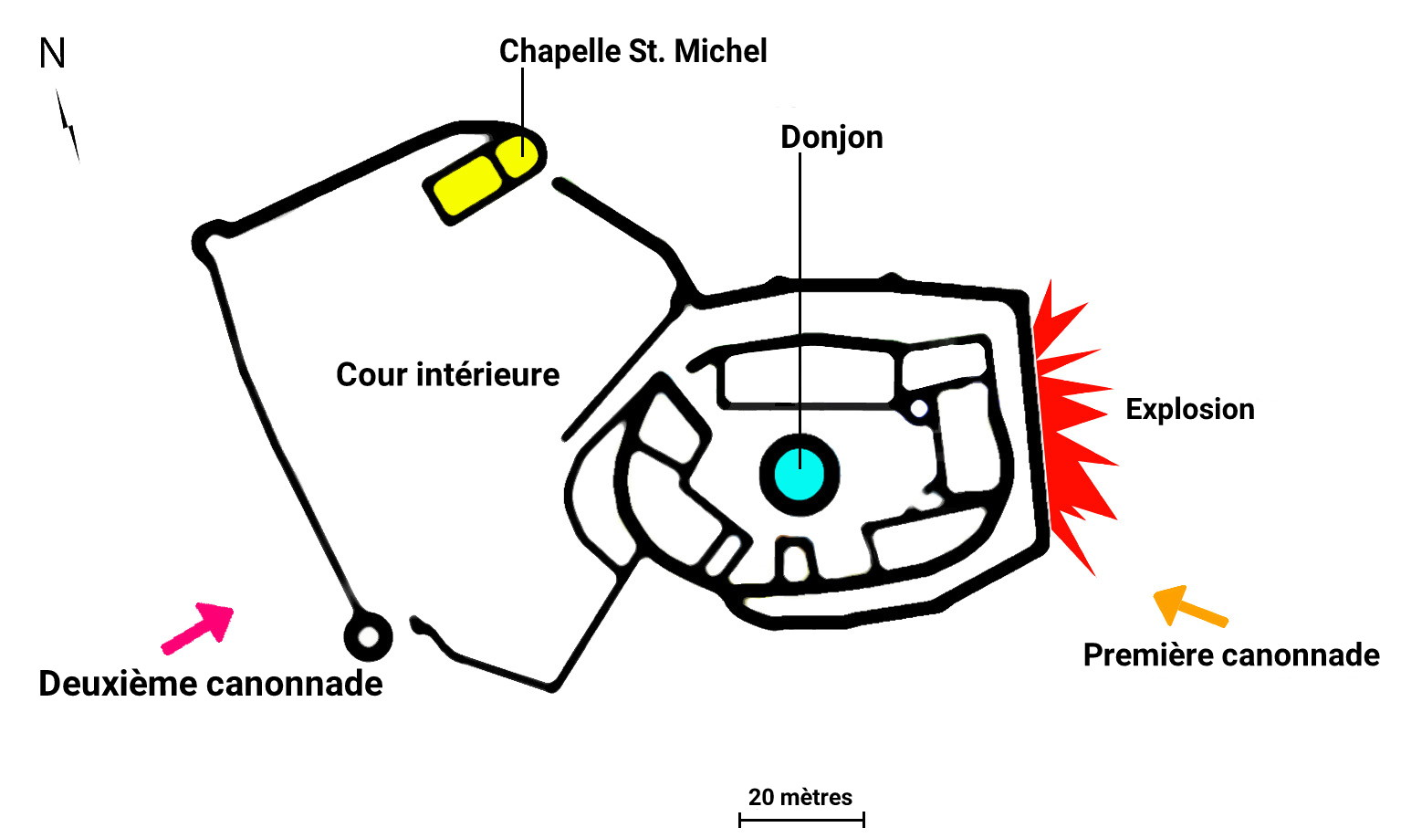 Carte du siège de Godesberg